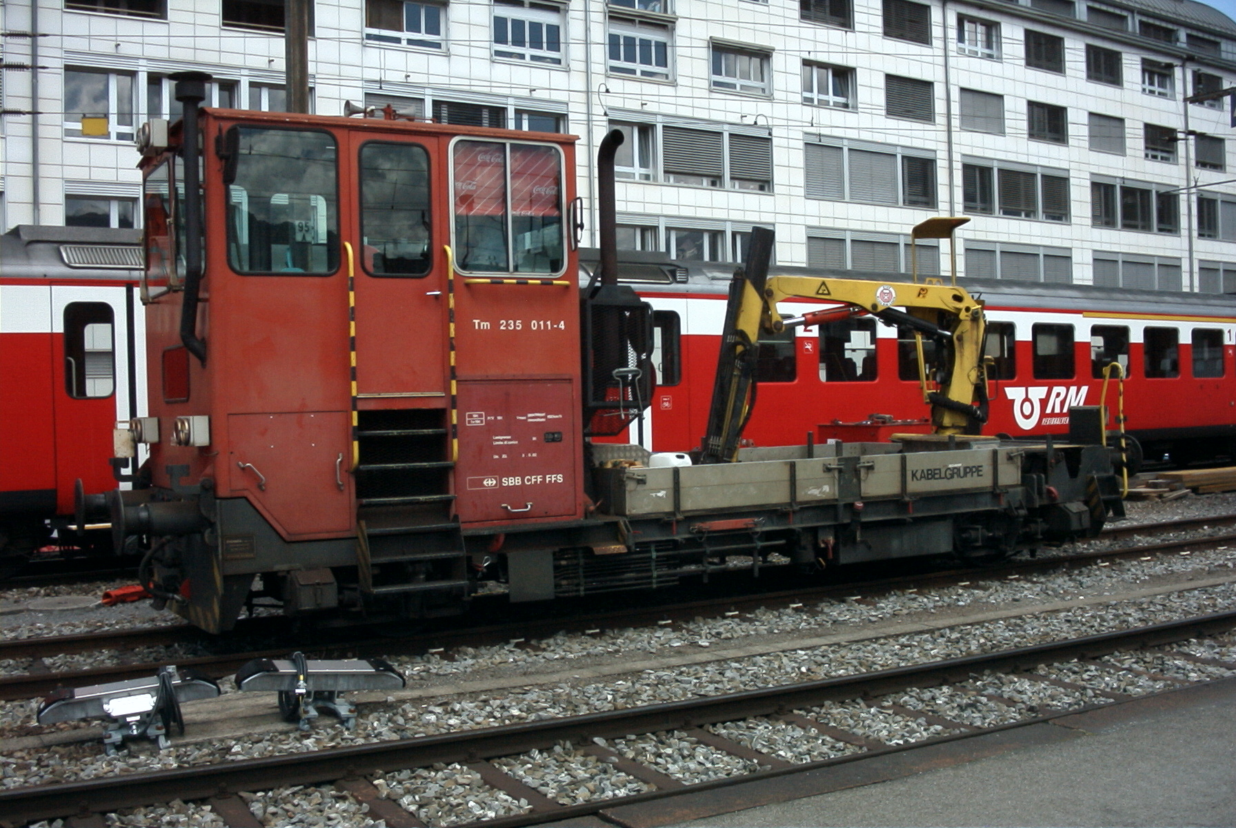 SBB Robel Tm 235 011 in Thun